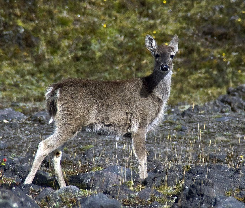 Venado de páramo (Odocoileus ustus) fotografiado en el Parque Nacional Cotopaxi, Ecuador.